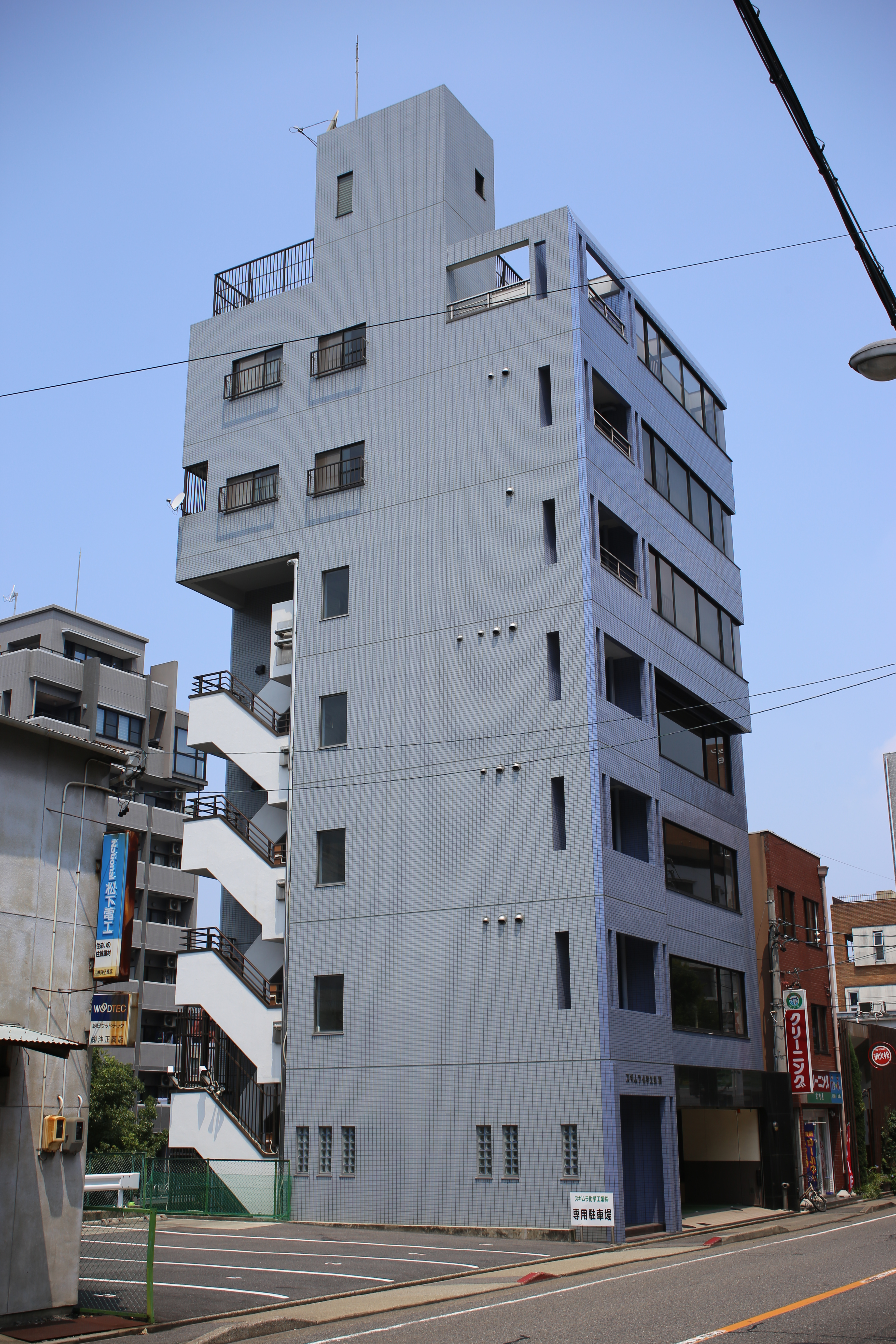 名古屋市中区丸の内一丁目のスギムラ化学工業本社を東側公道南側より撮影